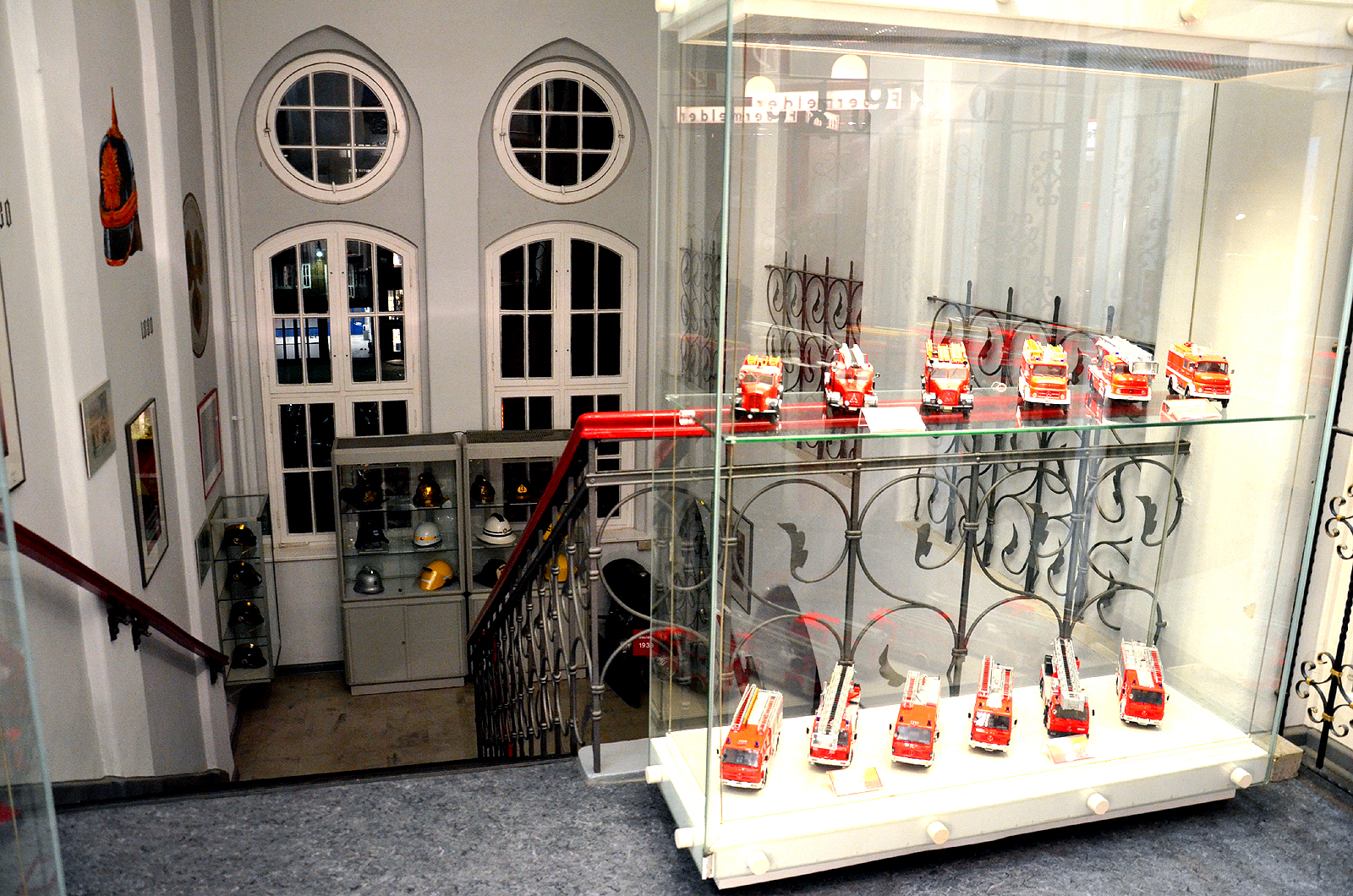 Vitrinen des Feuerwehrmuseums Hannover im Treppenhaus der ehemaligen Katholischen Bürgerschule von 1884, hier gesehen am 15. Juni 2014 kurz nach Mitternacht während der 16. Nacht der Museen ...